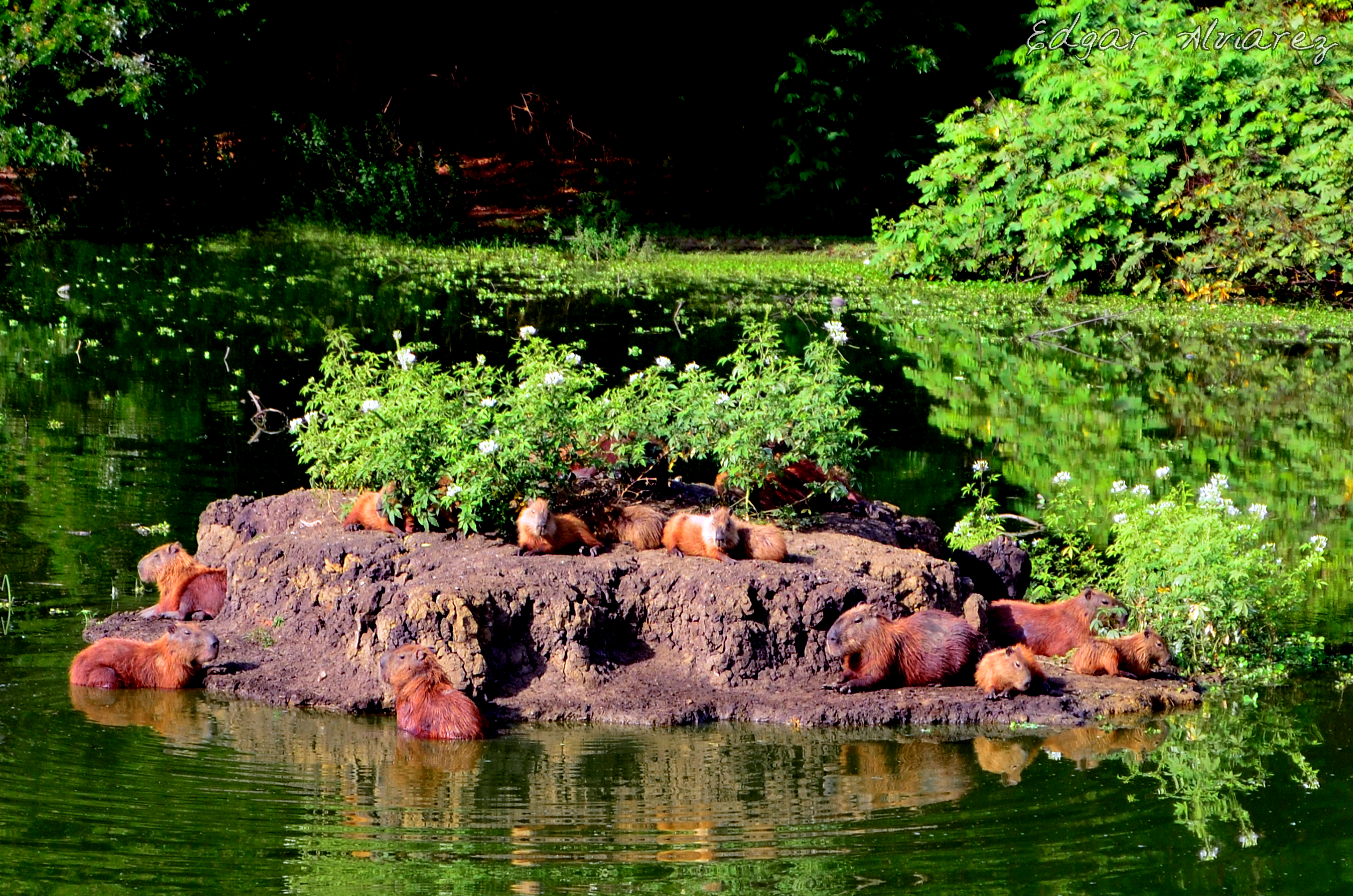 Foto tomada durante una caminata fotográfica en San Juan de los Morros, Edo Guarico.